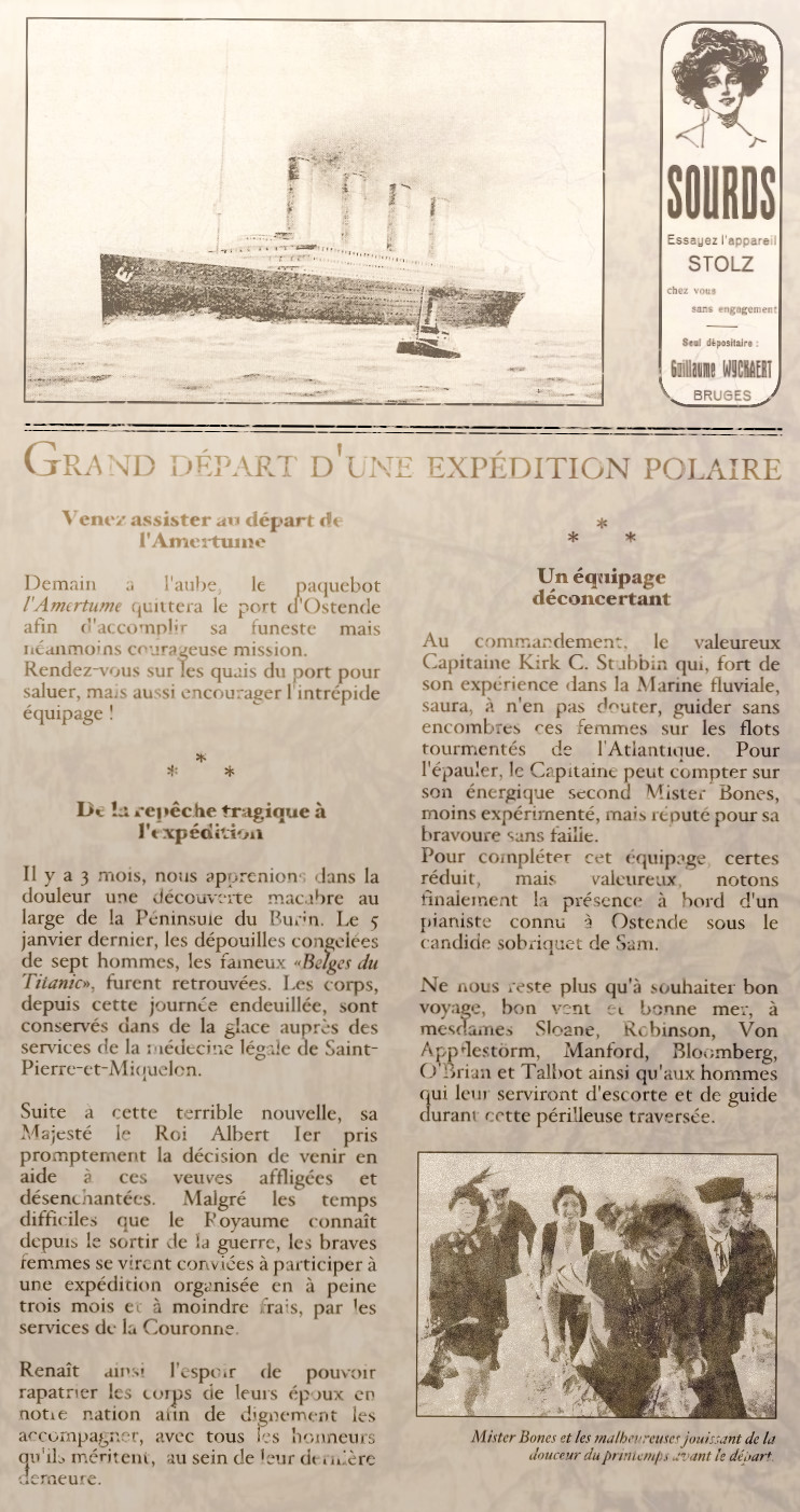 Extrait de presse - La Gazette d'Ostende (5 avril 1920)